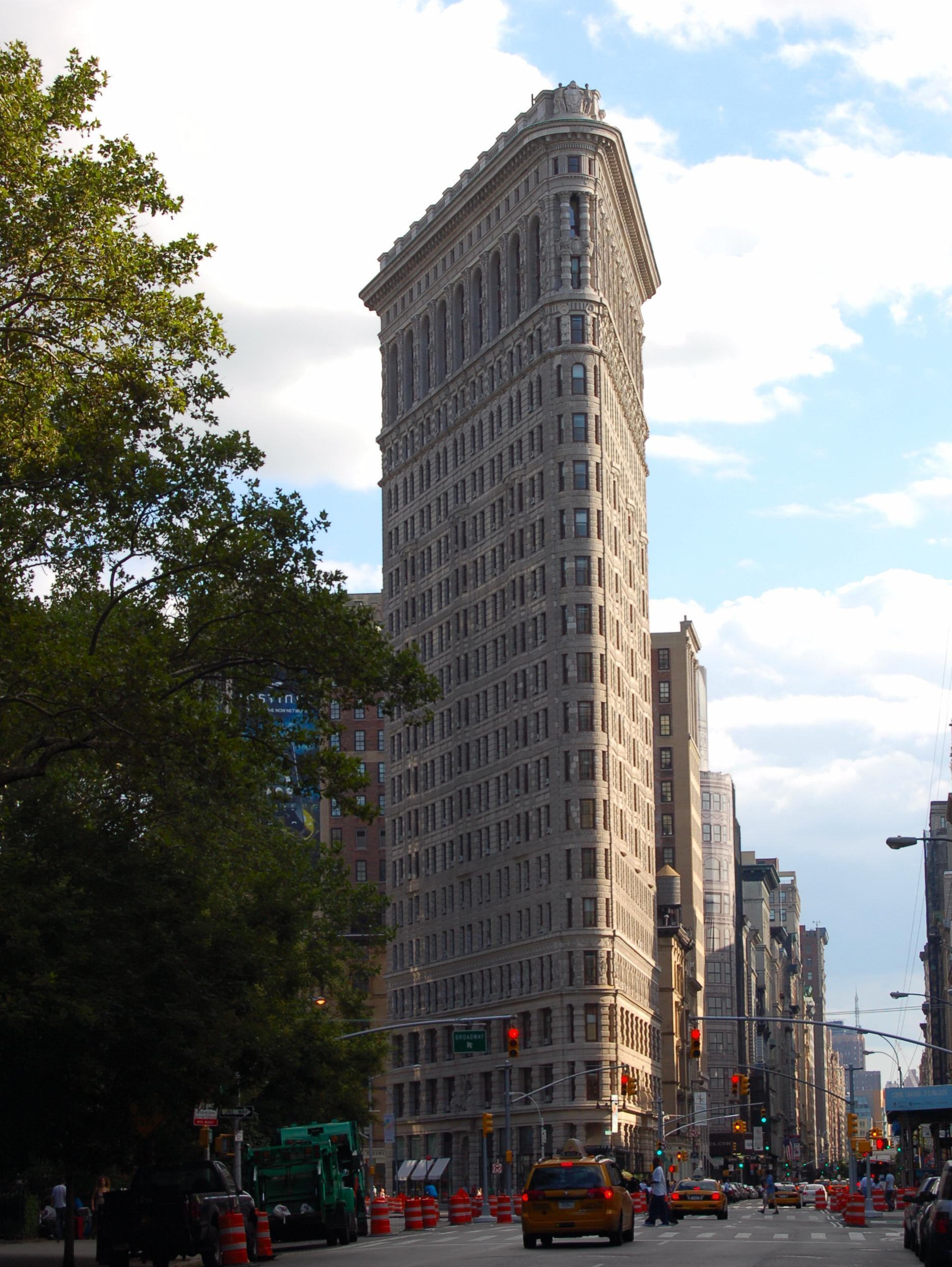 Le célèbre Flatiron Building de New York (Manhattan) photographié en août 2008.